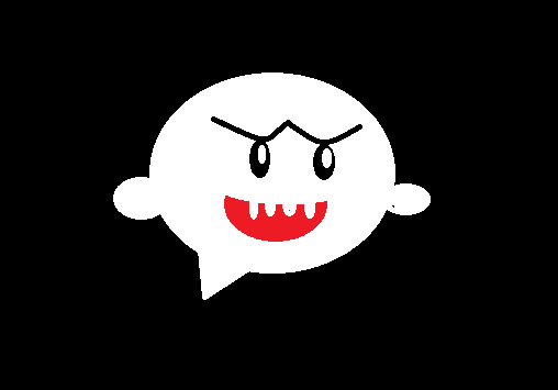 Imagen de un Boo.